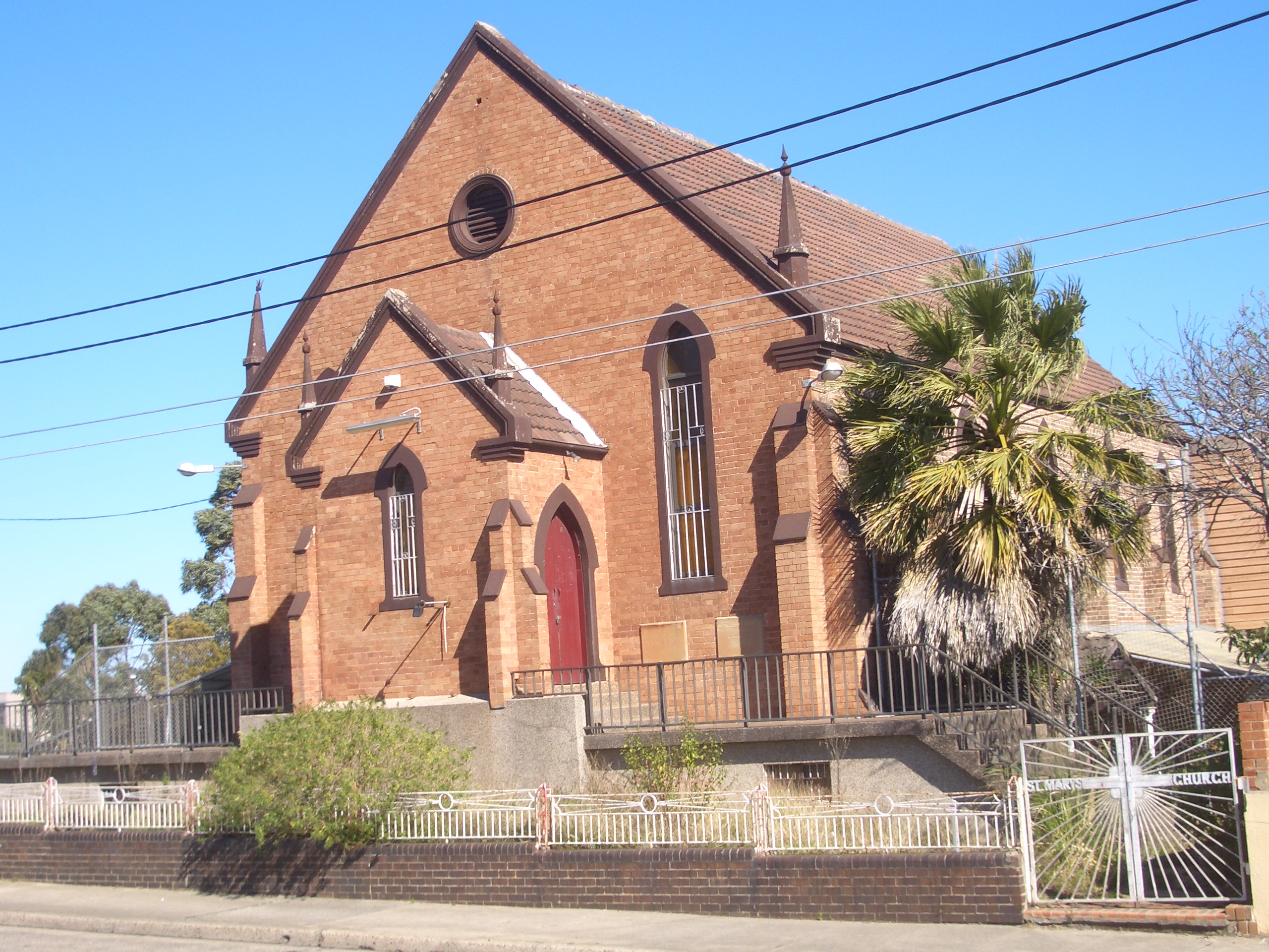 St Marys, Sydenham